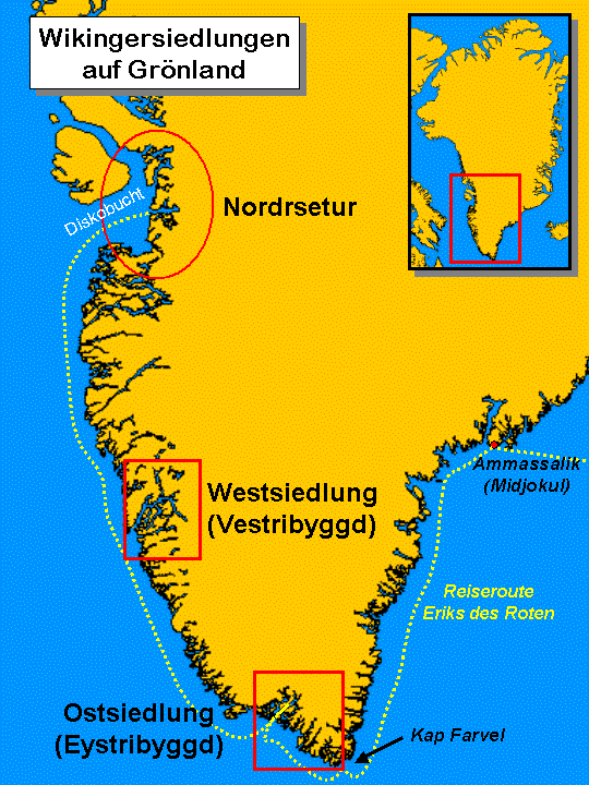 Karte der Wikingersiedlungen in Grönland